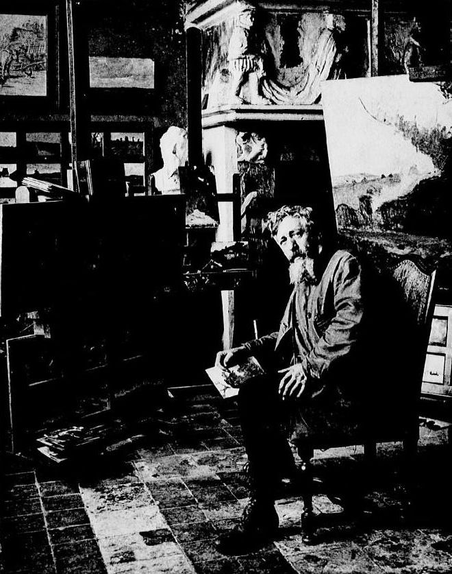 French artist